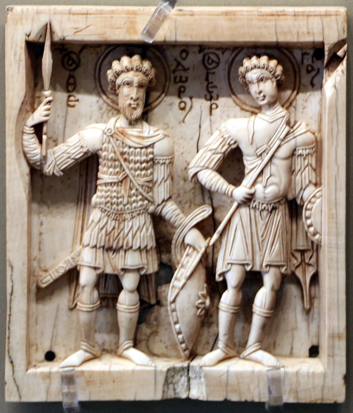 Museo Archeologico Nazionale This is a photo of a monument which is part of cultural heritage of Italy.